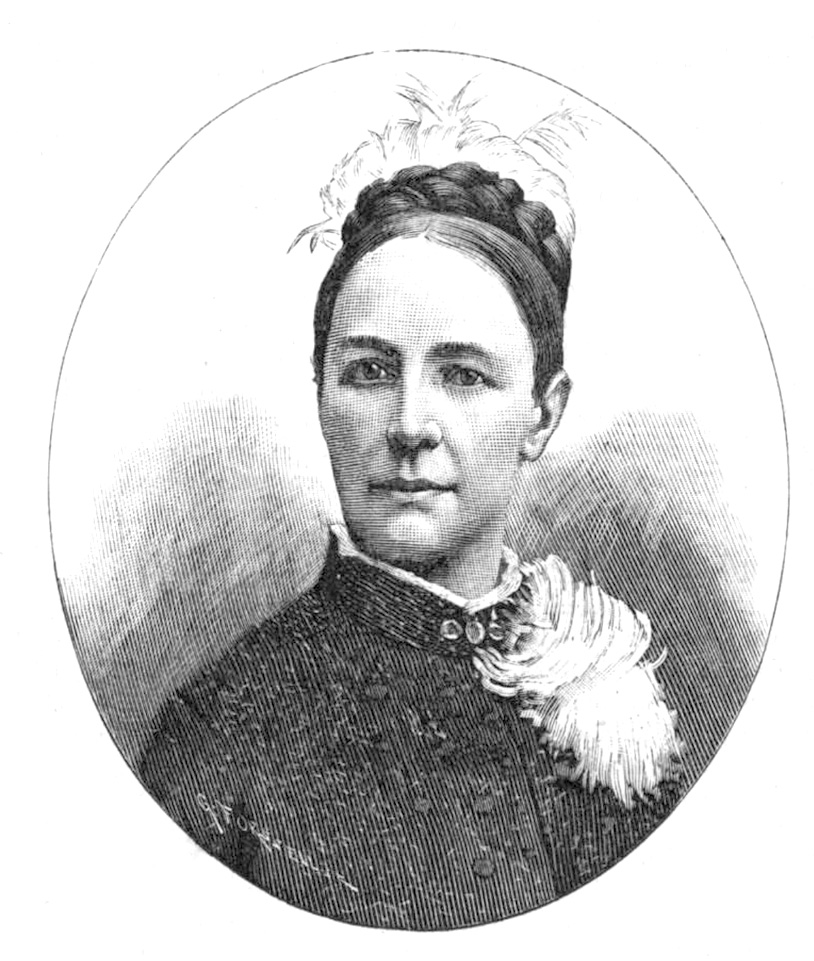 Hildegard Werner (1834-1911)